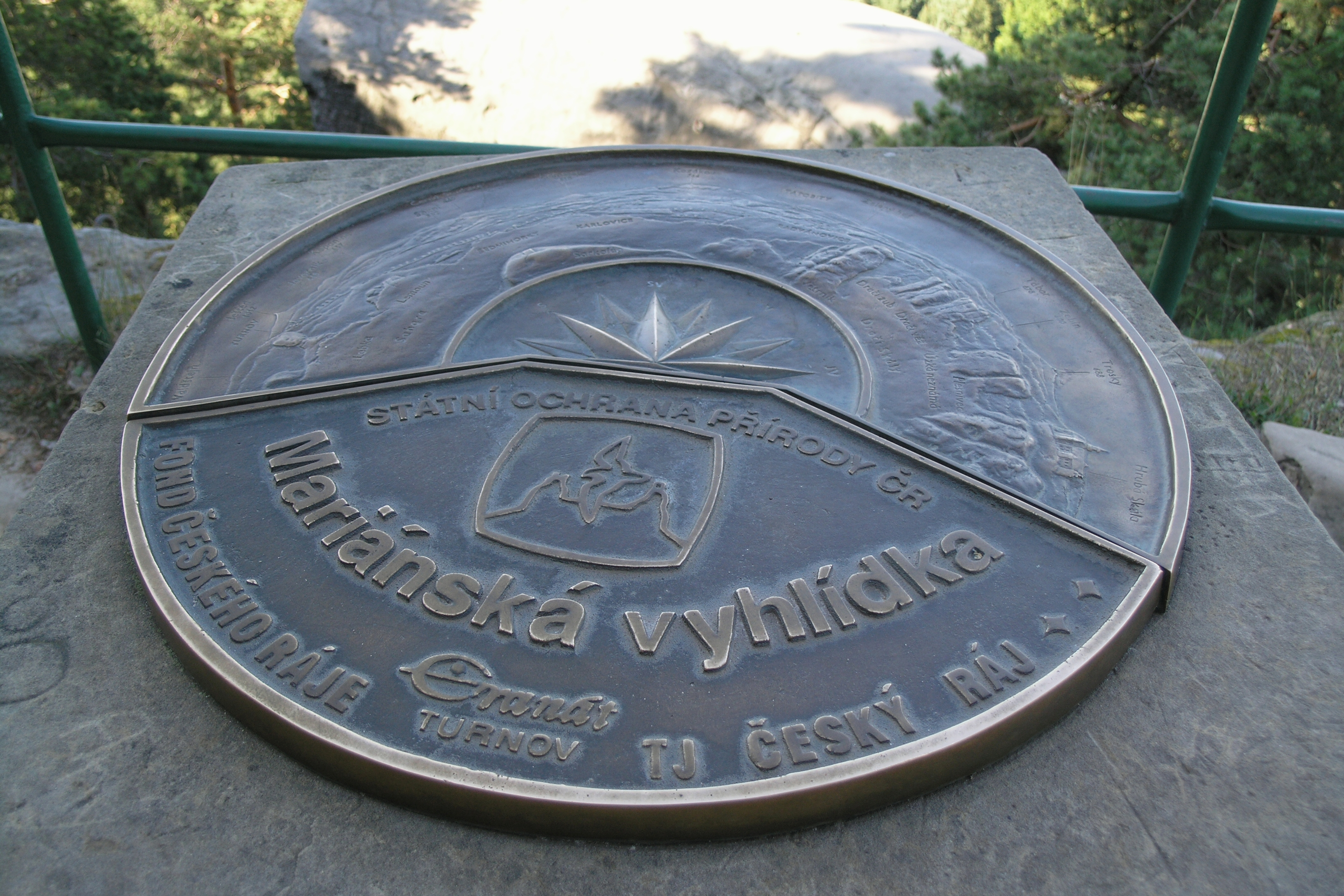 Hruboskalsko